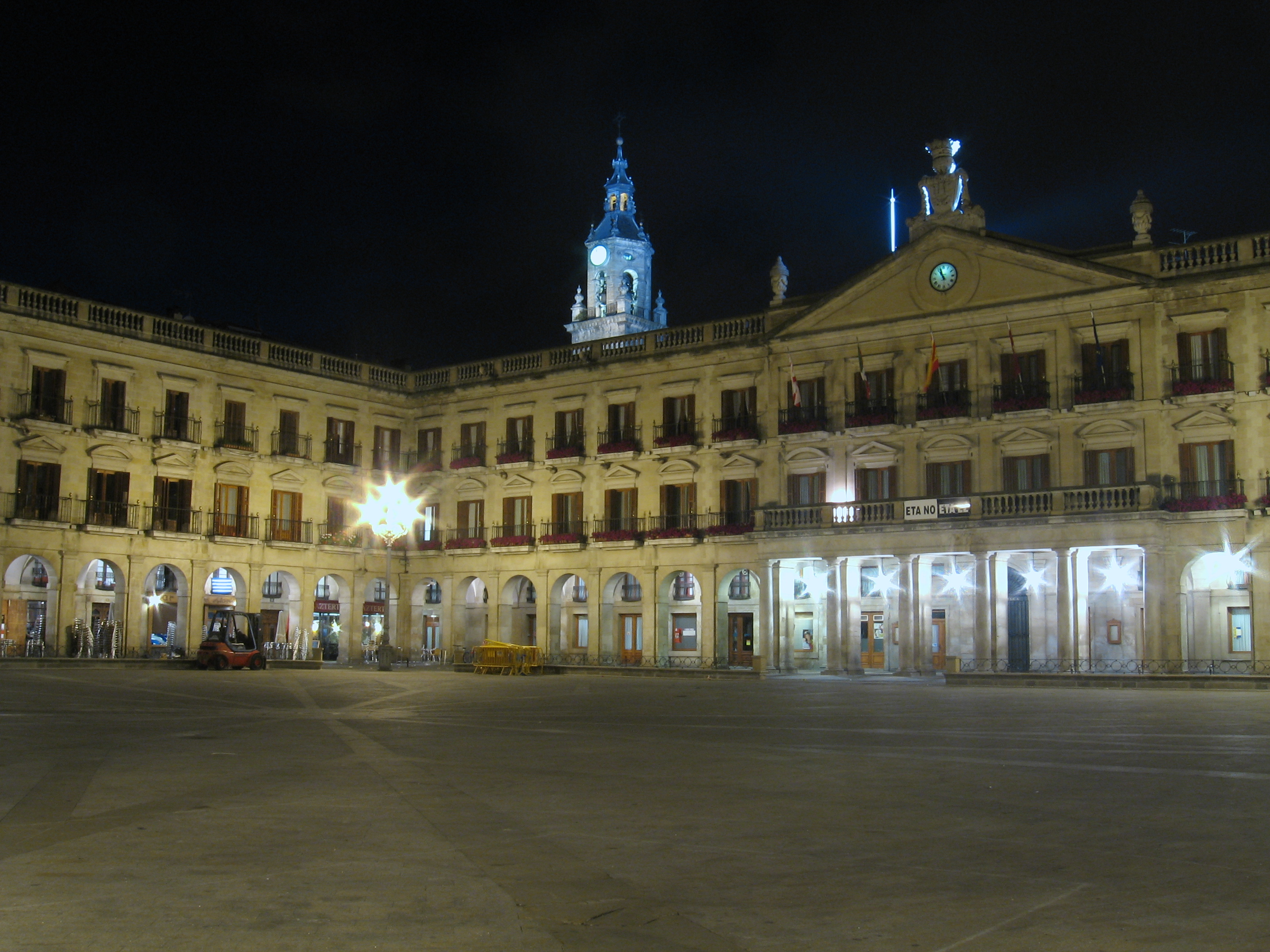 Desc: Plaza Nueva de Vitoria-Gasteiz